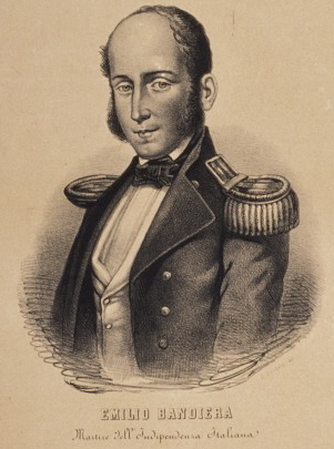 "Ritratto di Emilio Bandiera" ridotto